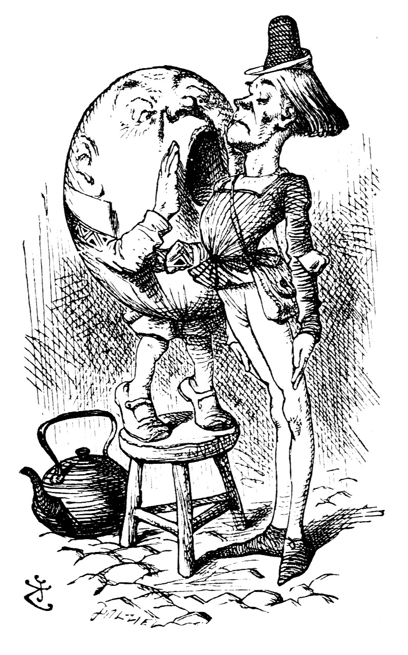 гравюра Джона Тенниела